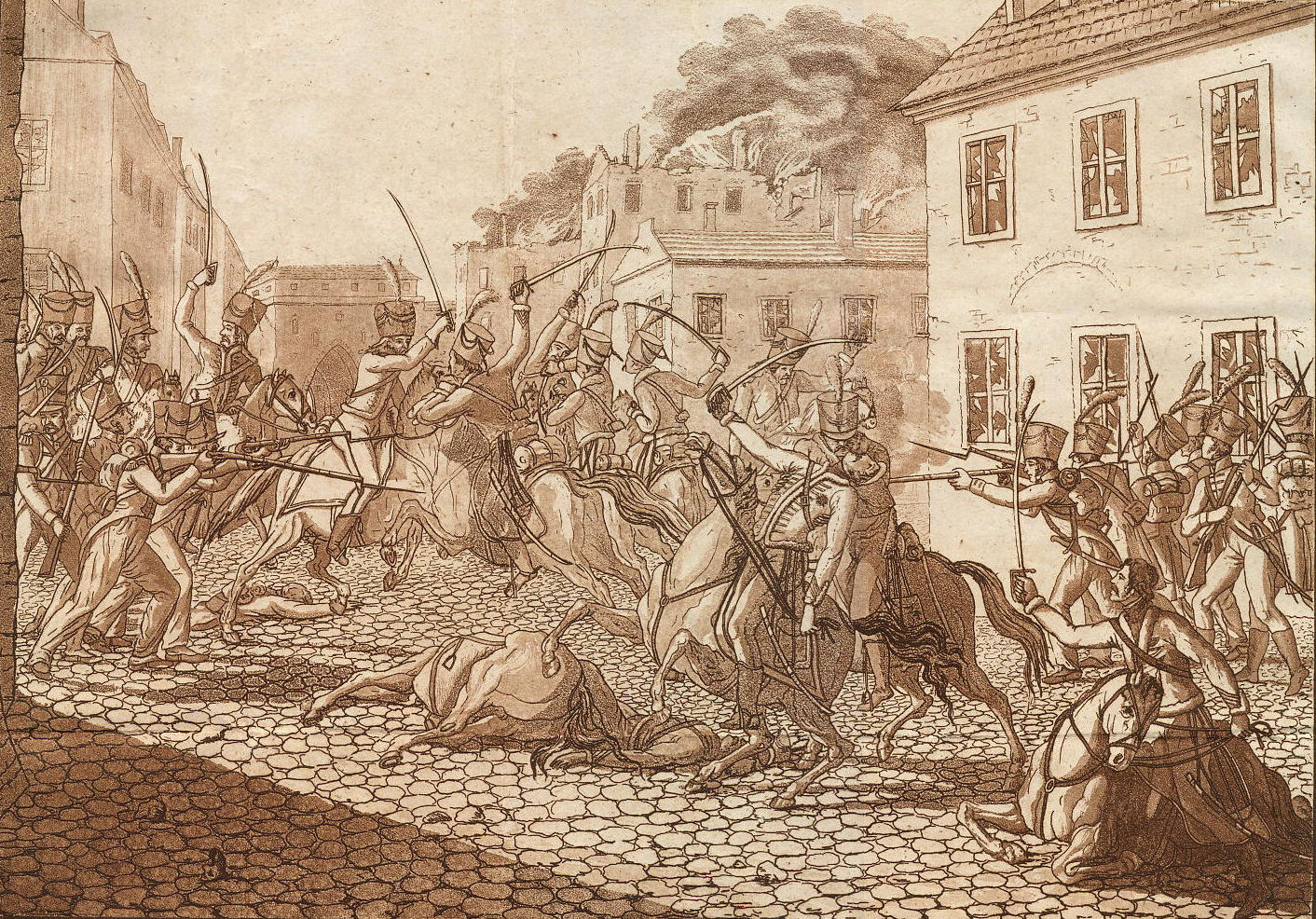 Strassenschlacht Stralsund Freikorps Ferdinand von Schill Holländisches und Dänisches Militär.